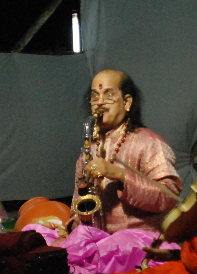 Kadri Gopalnath performing at Pillayarpatti